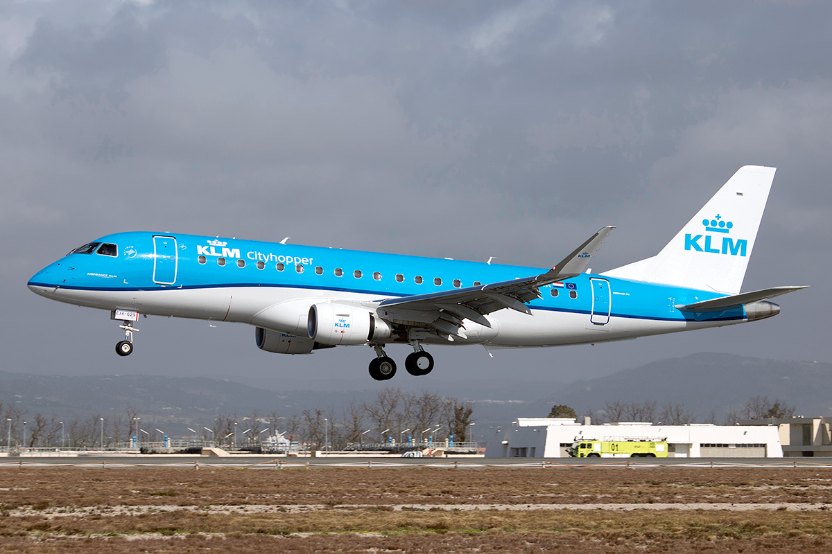 Delivery flight